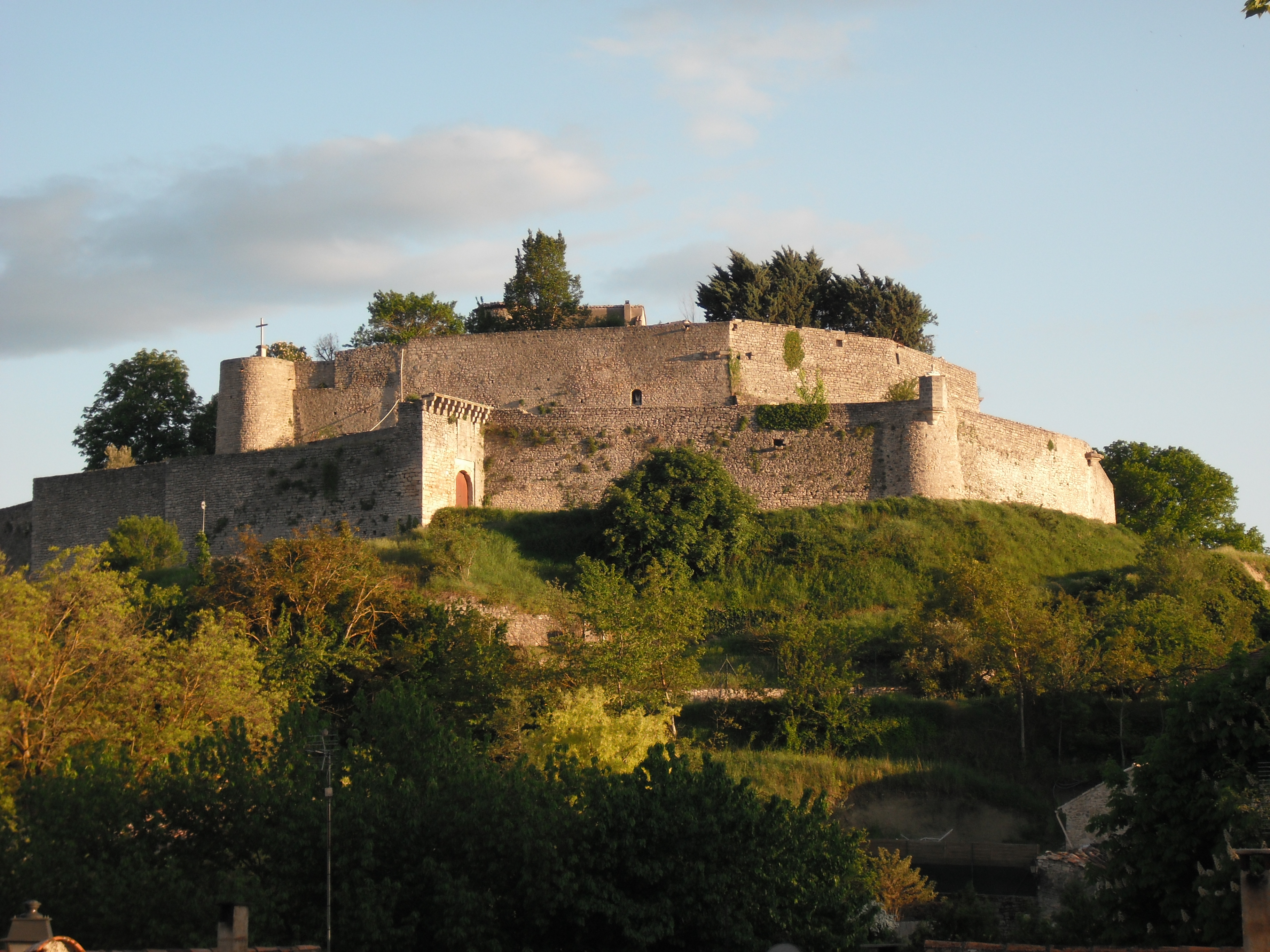 Château de Mane (Alpes-de-Haute-Provence).